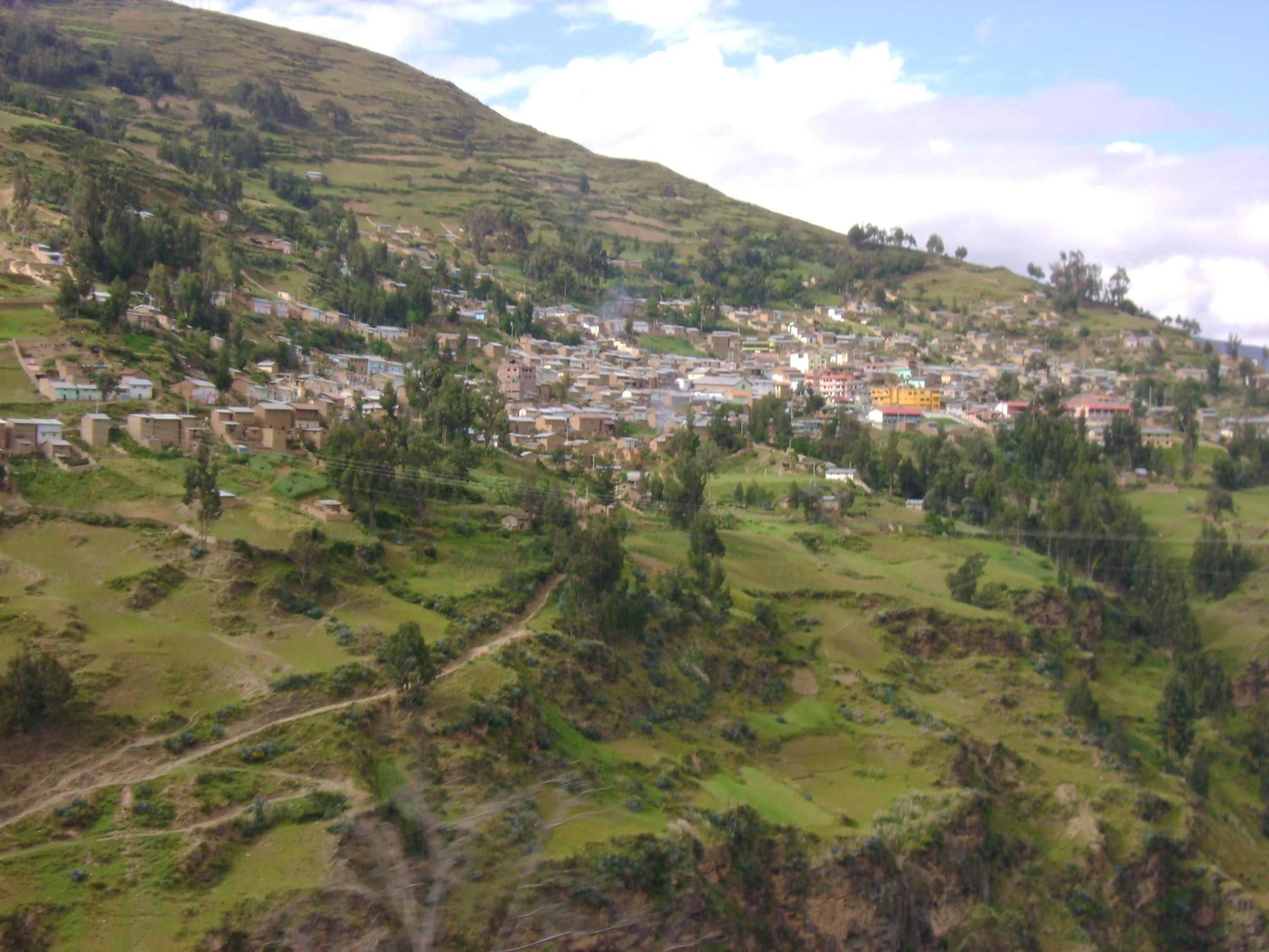 Chavinillo